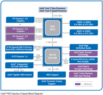 GÖRSEL